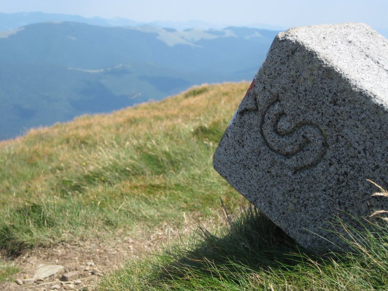 Relict on CS-PL border(1918-1945).